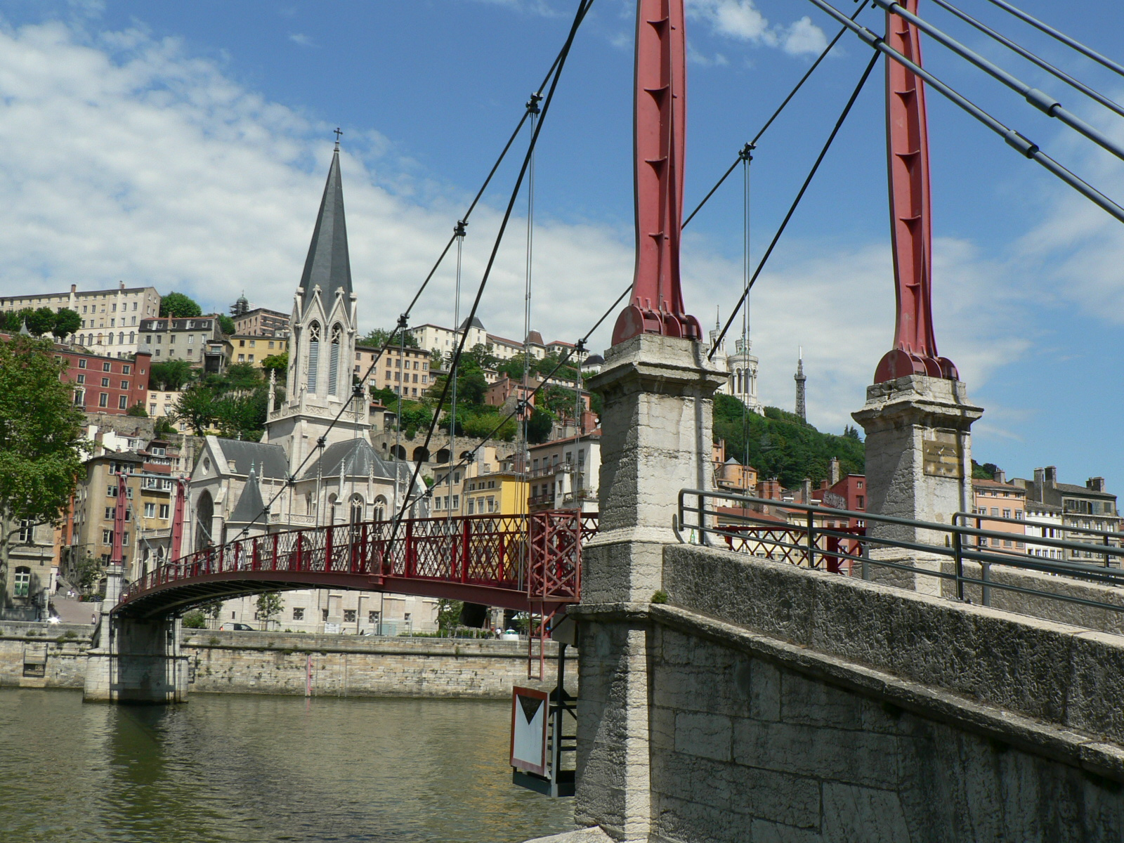 Ponts de Lyon - Passerelle Paul Couturier